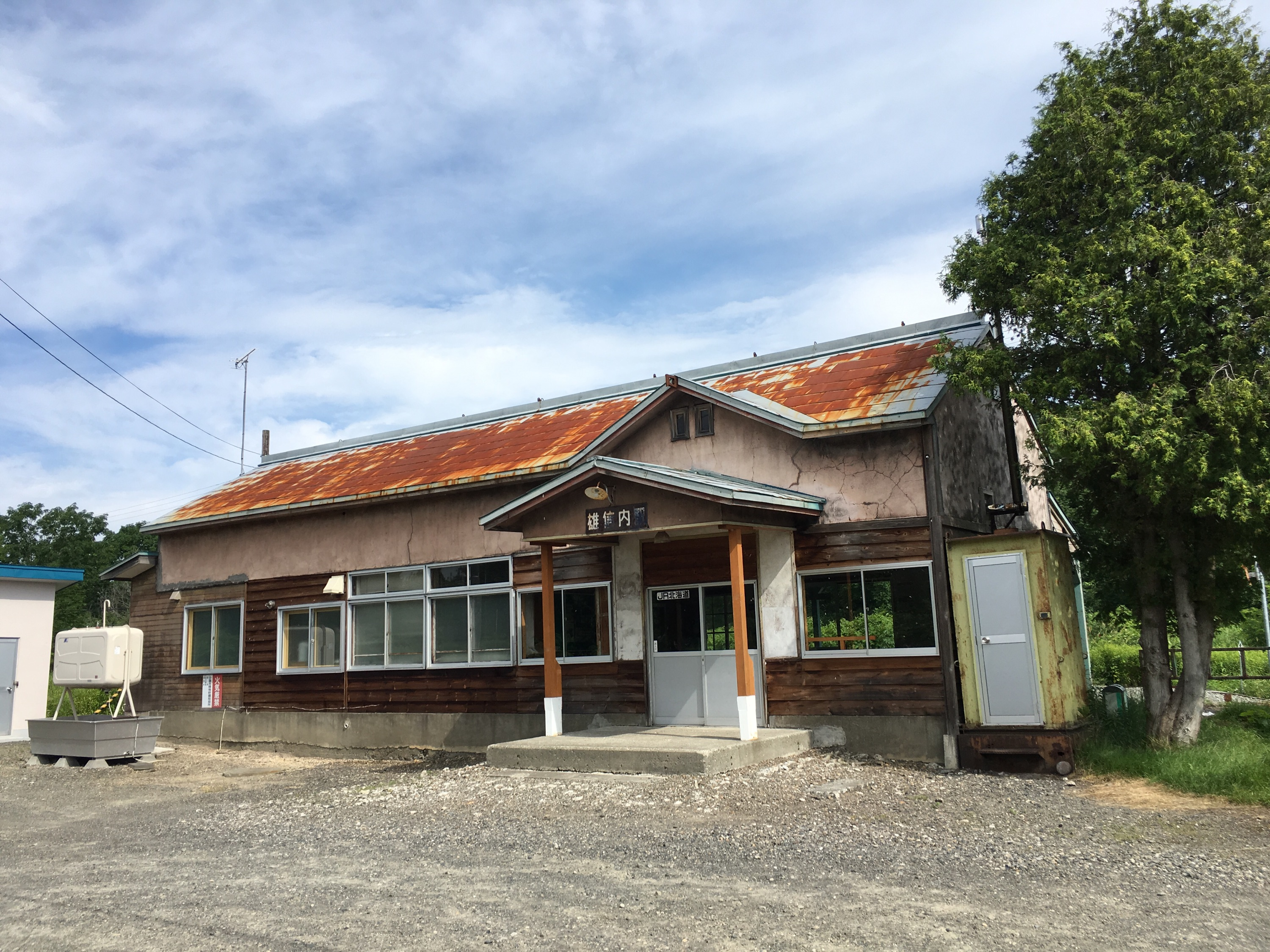 駅舎